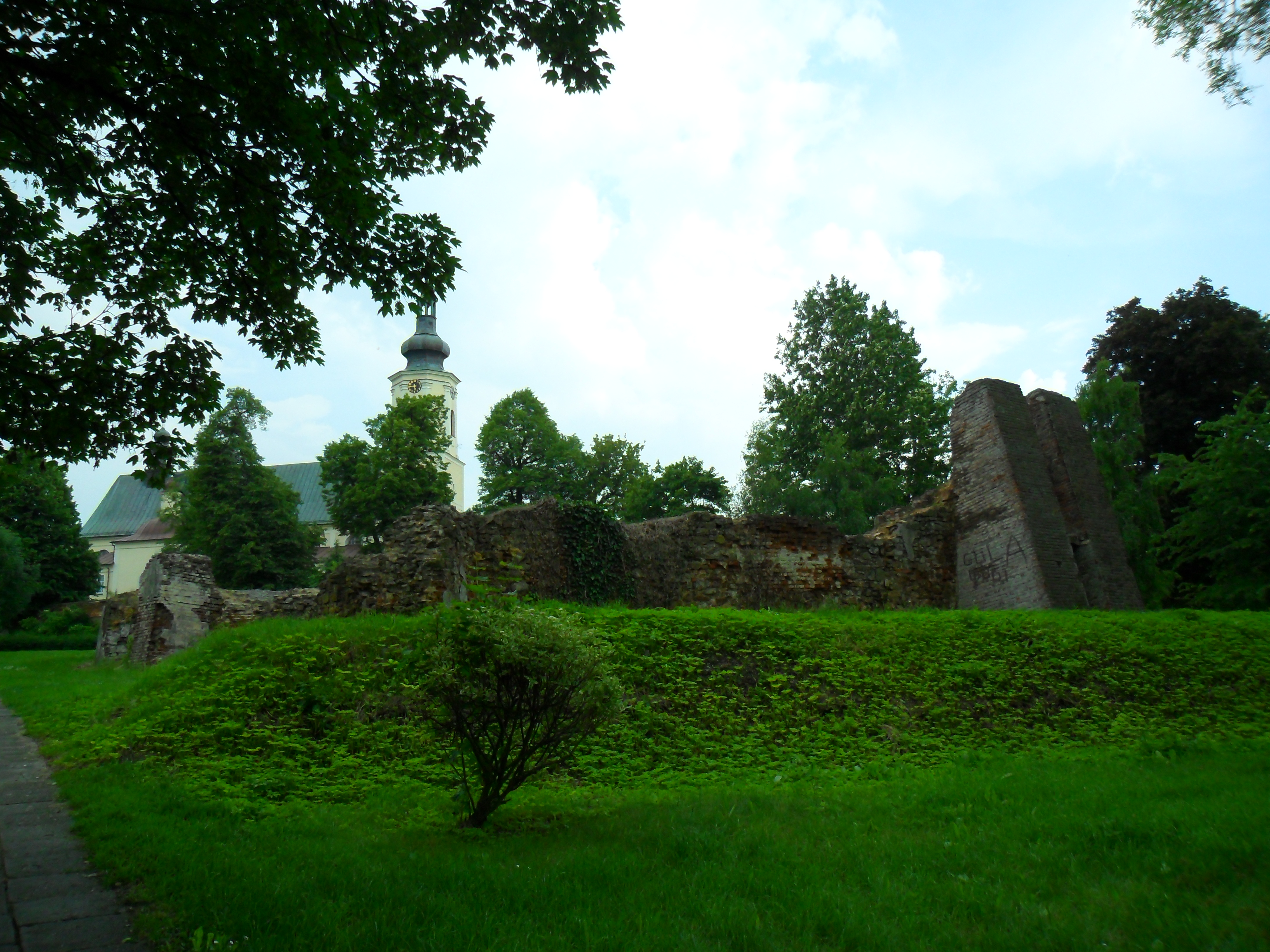 Ruiny pałacu Gaschinów w Kietrzu